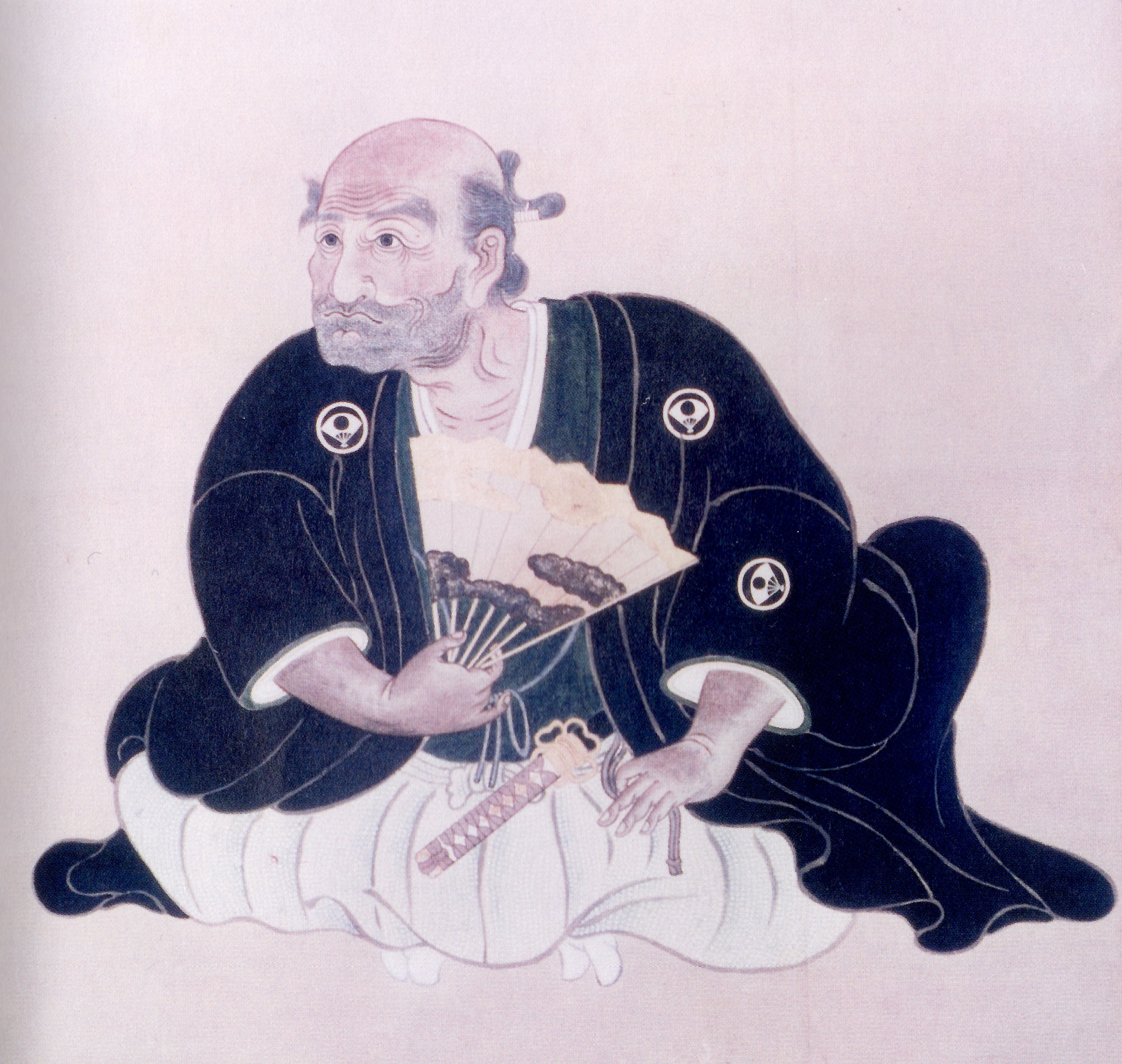 佐竹義隆の肖像。